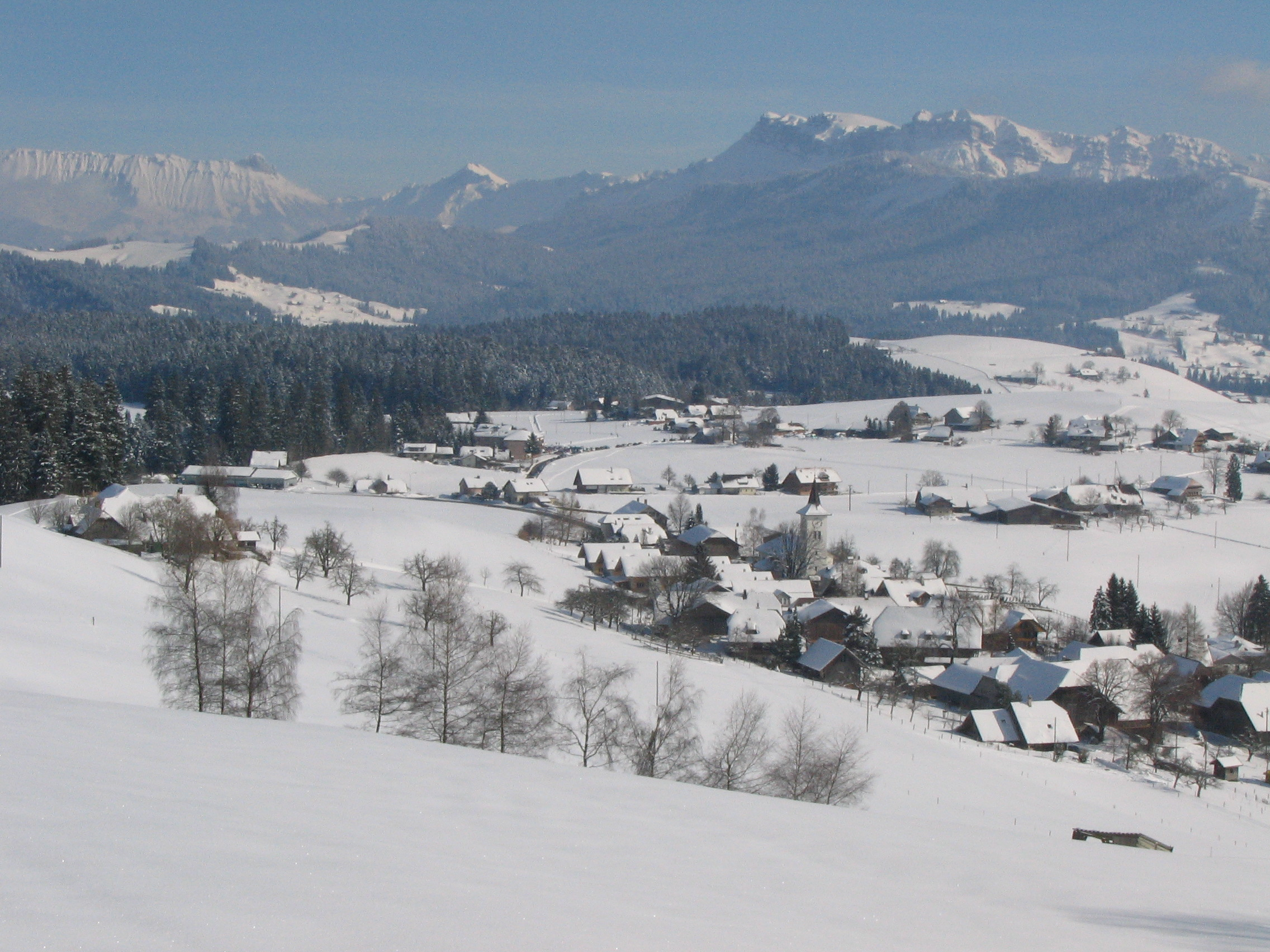 Heimenschwand